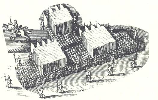 Schwedische Ordonnanz in einem Stich von Merian